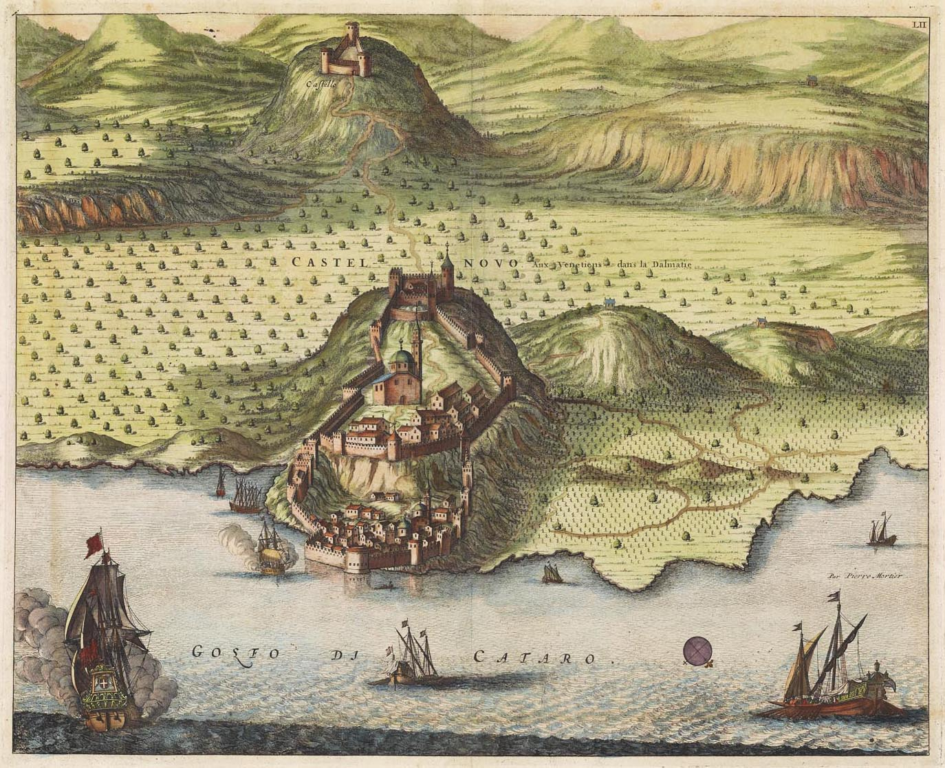 Citta di Castelnuovo(Bochhe di Cattaro). Incisione in rame, acquarellata, di Pierre Mortier (1661-1711), circa 1700. Da: Jean Janvier, Turquie d'Europe et Partie de Celle d'Asie divisée par grandes Provinces et Governements, come riedita in: Atlas Moderne ou Collection De Cartes Sur toutes les parties du Globe Terrestre , Jean Lattré & Delalain, Paris 1787.